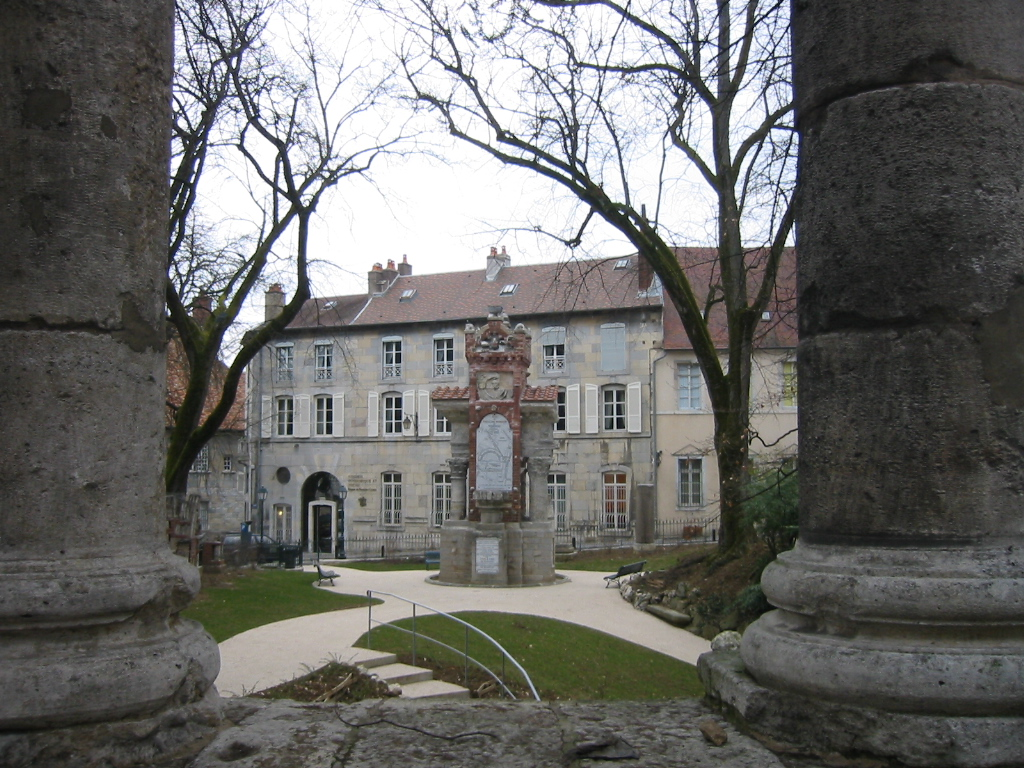 Square Castan, Besançon: Ruines romaines et vestige de l'église Saint-Jean-Baptiste remontées, suite aux fouilles archéologiques dirigées par Auguste Castan au XIXe siècles, pour créer un parc archéologique dans le gout romantique de l'époque. Les vestiges romains comprennent les restes de l'aqueduc arrivant des sources d'Arcier et qui permettait aux habitants de la ville de s'abreuver, ainsi qu'un monument semi-circulaire, qui fut interprété comme un théâtre, hypothèse contester aujourd'hui, par la découverte des véritables vestiges de celui-ci légèrement en amont, sous l'hôtel de Région.